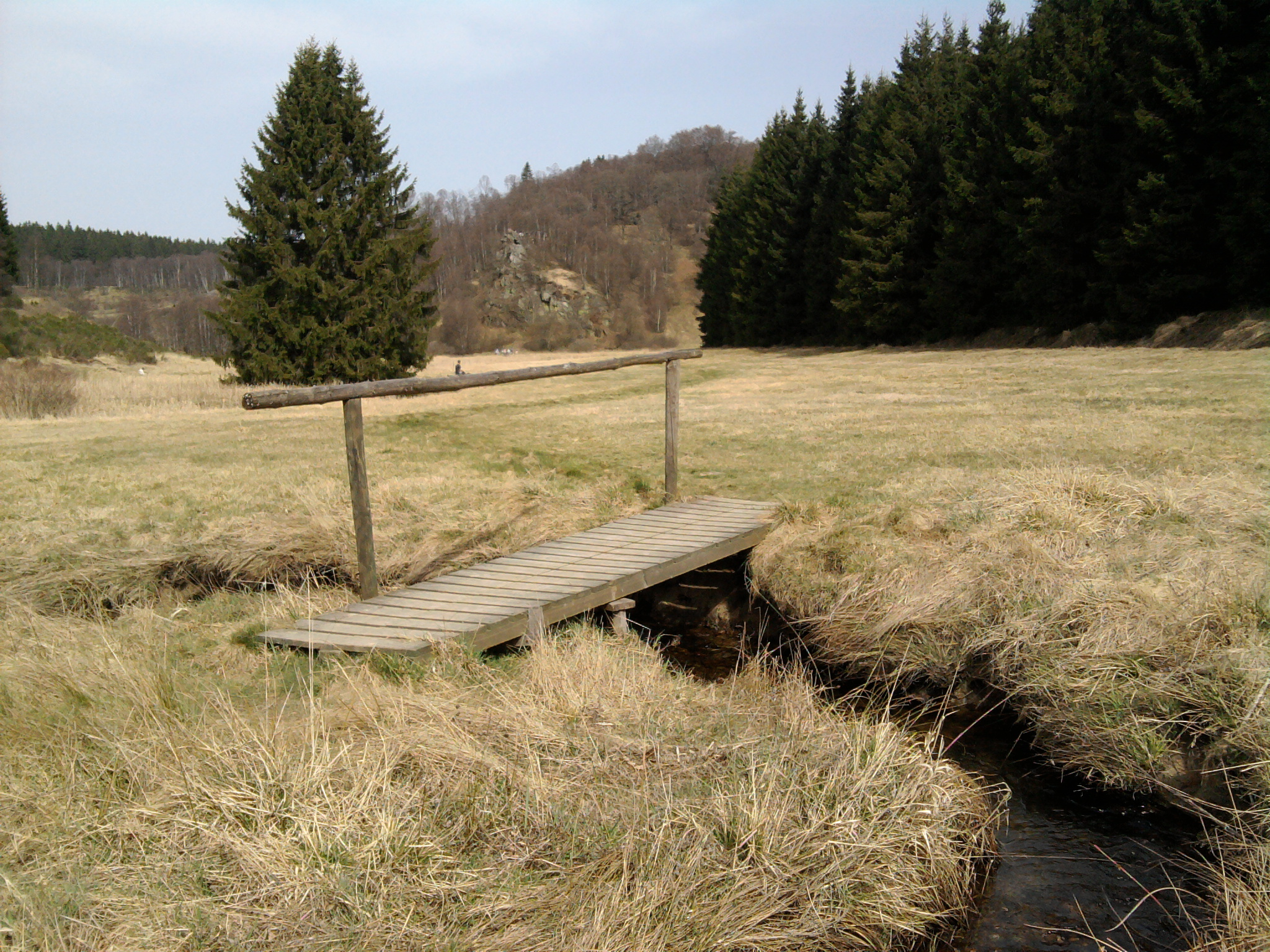 Blick zum Fels Bieley im Perlenbachtal (Belgien) im März 2014